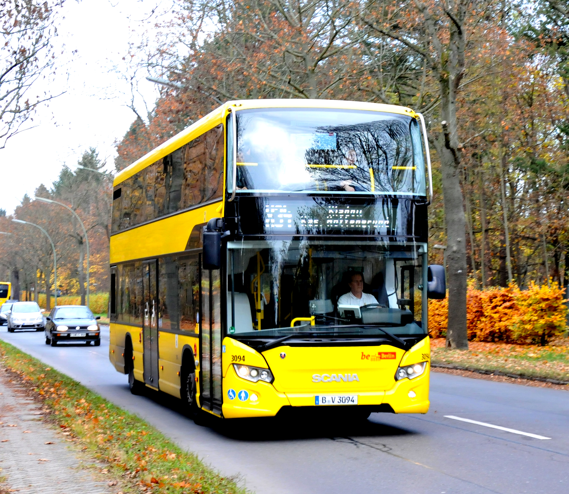 Berliner Verkehrsbetriebe (BVG) bus 3094 van het type Scania Citywide LFDD als lijn X34 bij Krankenhaus Havelhöhe te Berlijn.